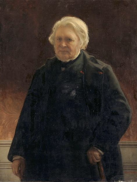 Victor Mottez